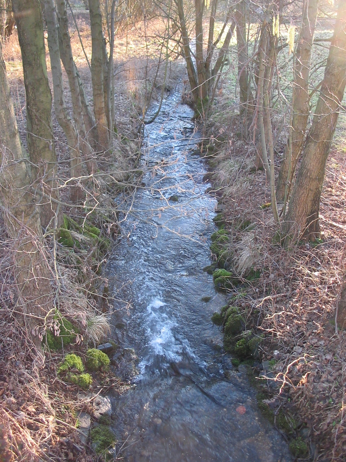 Der Gutenbach in Salchendorf, ein Nebenbach des Wildebach / The Gutenbach in Salchendorf, a tributary of Wildebach